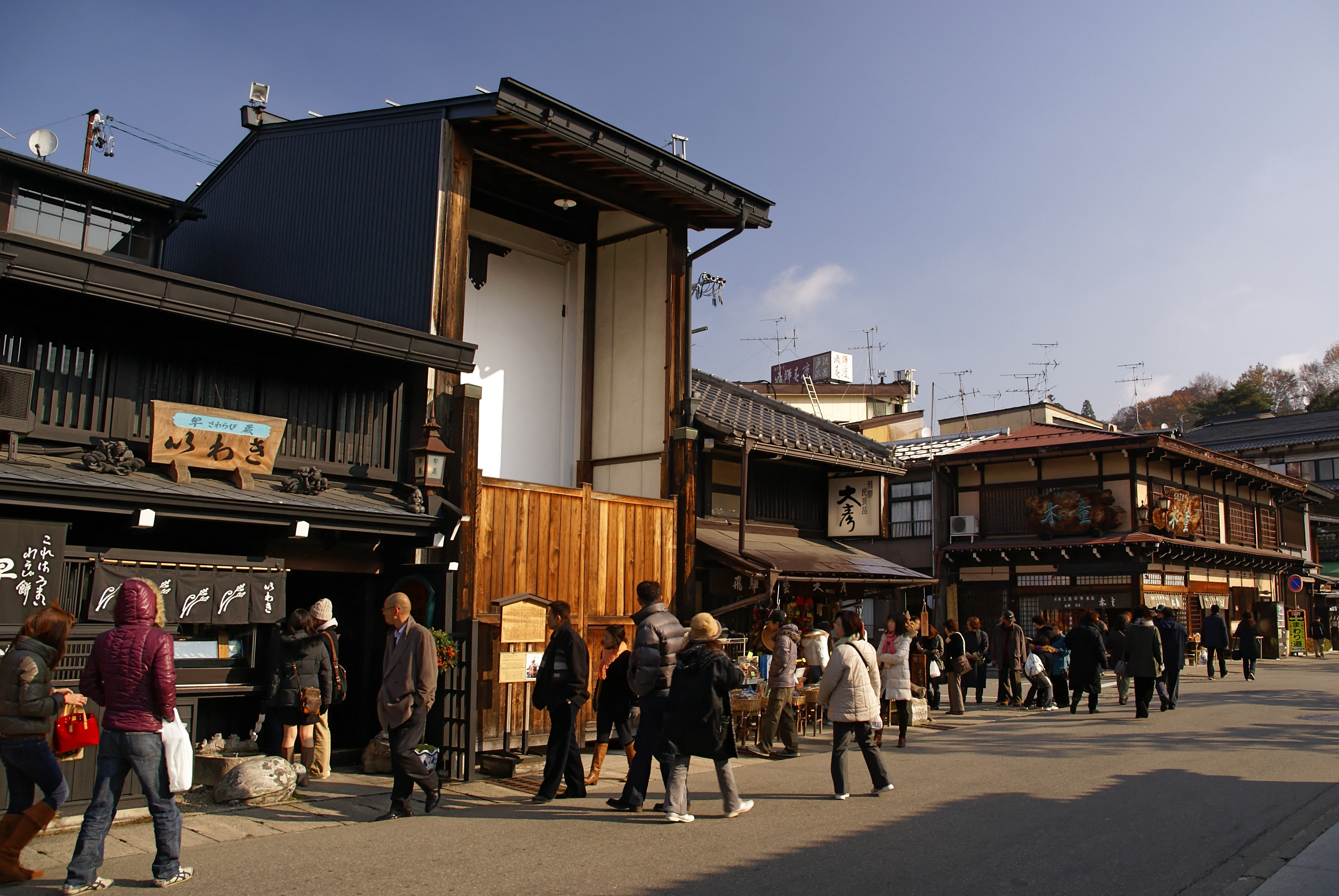 Sanmachi in Takayama, Gifu prefecture, Japan